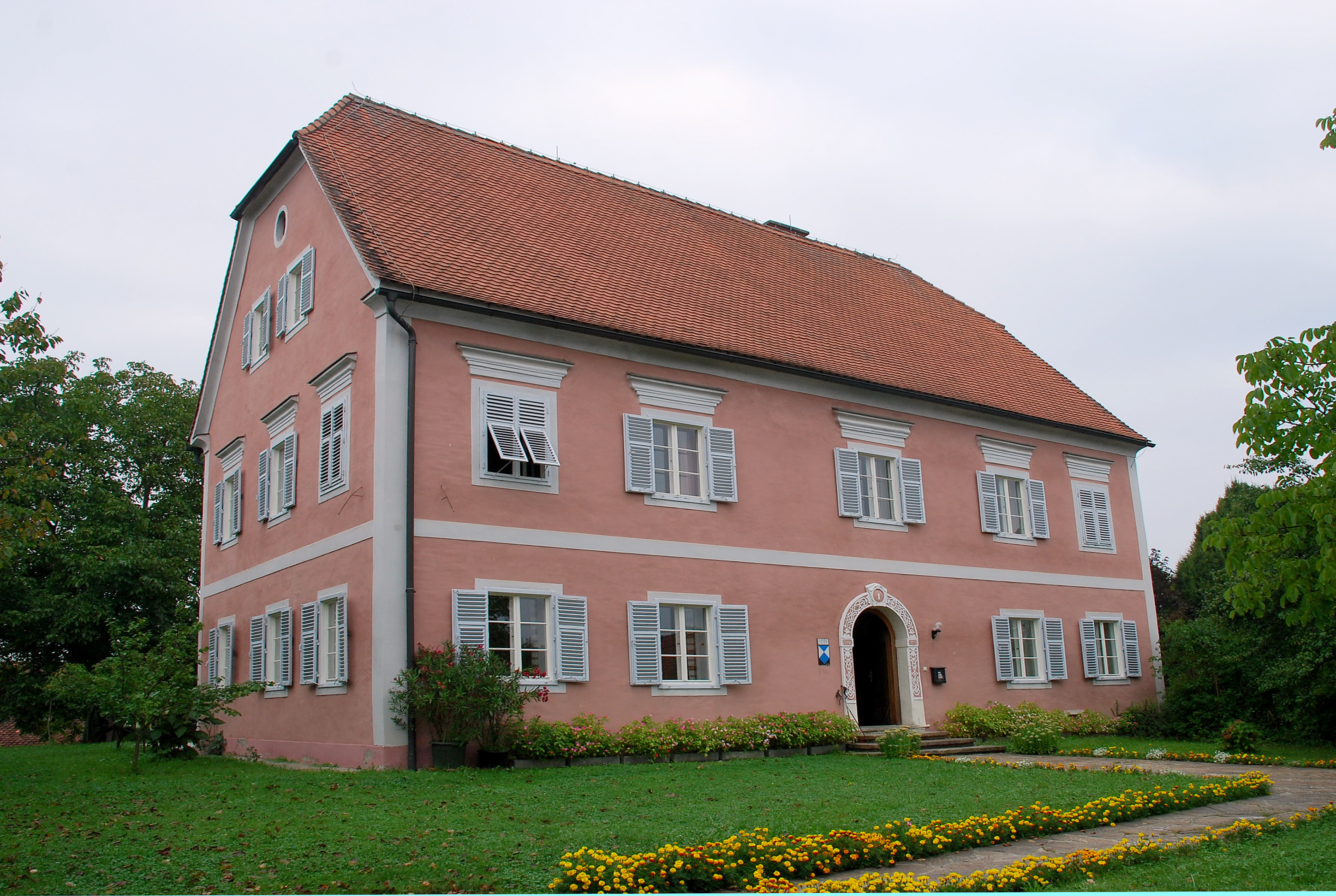 Preding, Weststeiermark: Pfarrhof